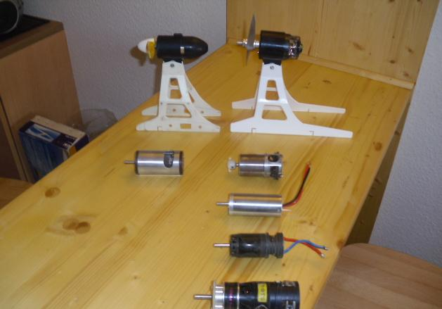 Frühe Elektroantriebe für den Modellflug Bühler/Geist/Keller/Robbe-Keller